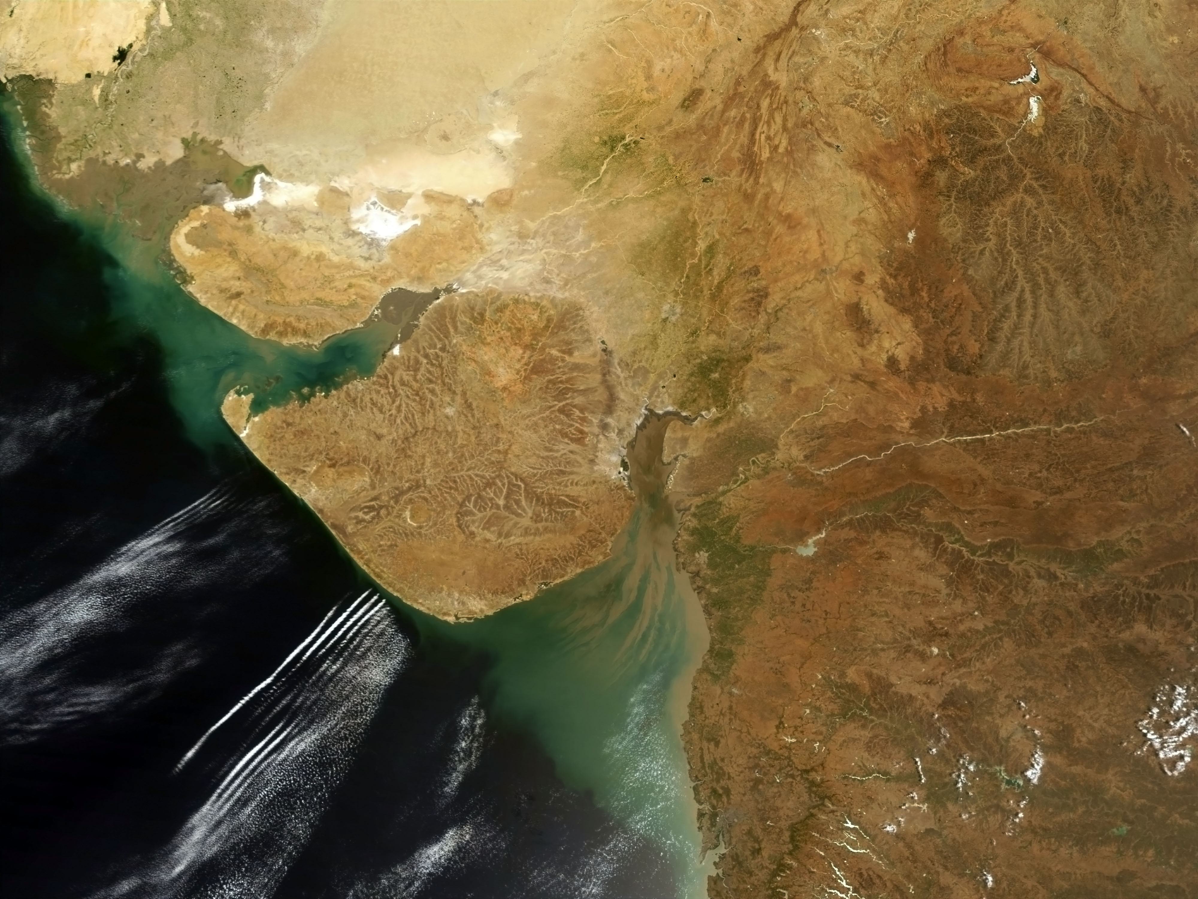 Vue satellitaire de Goujerat